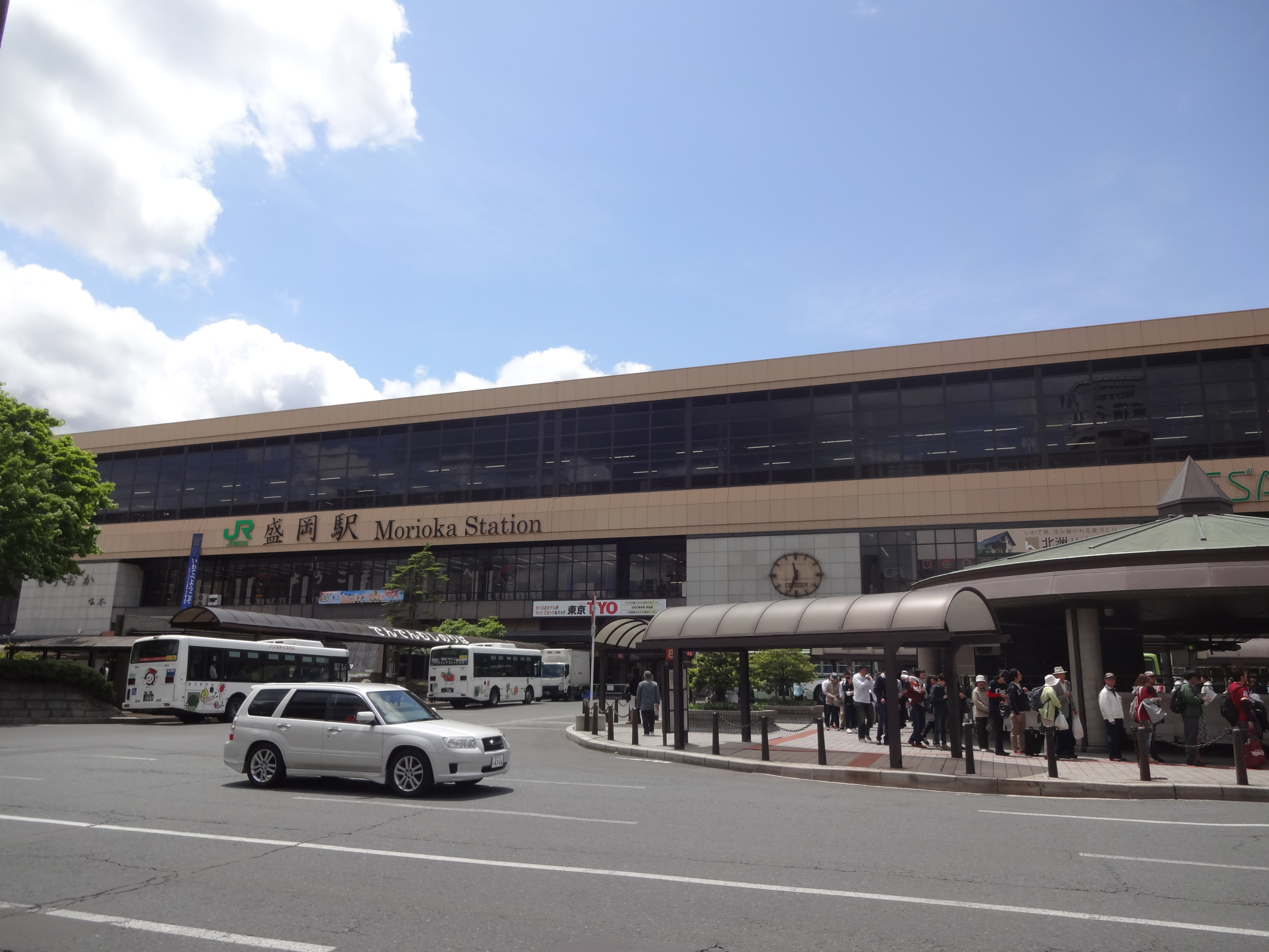 盛岡駅東口